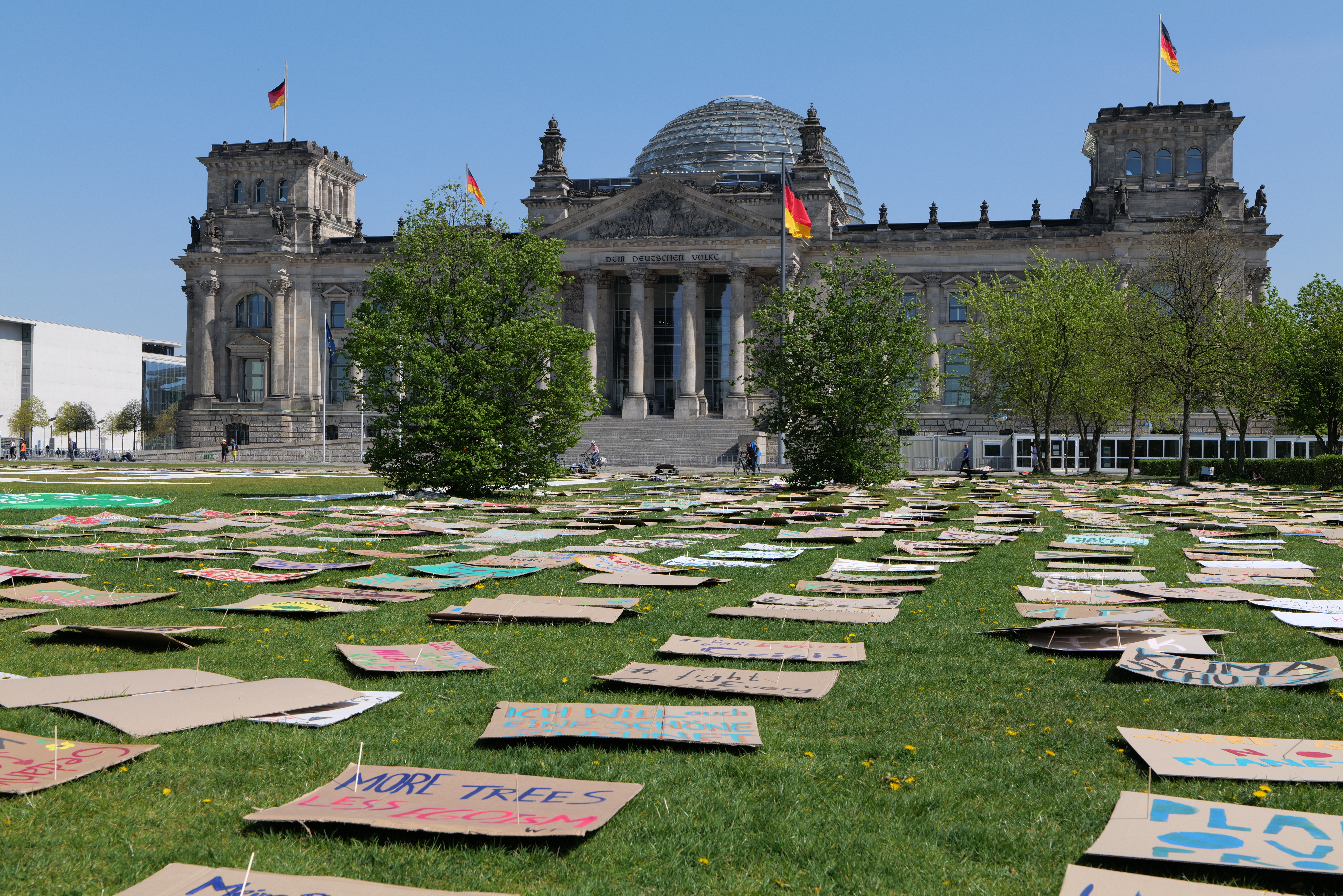 Protestaktion von Fridays for Future Berlin mit gesammelten Schildern auf dem Platz der Republik zum globalen Klimastreik am 24. April 2020.